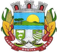 Brasão do município de Lagoa Bonita do Sul.